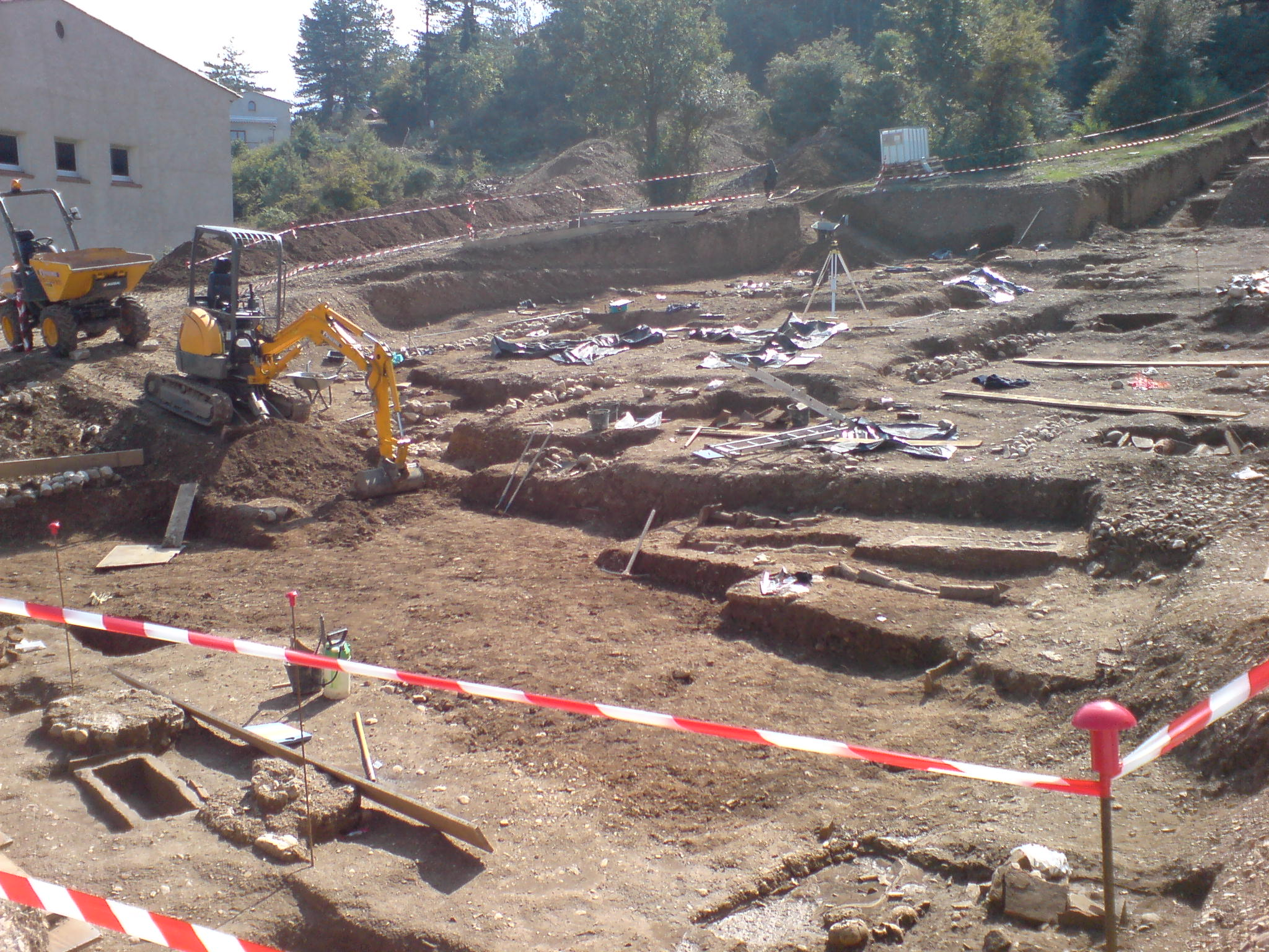 Fouilles archéologiques à Riez, proche du collège, été 2008